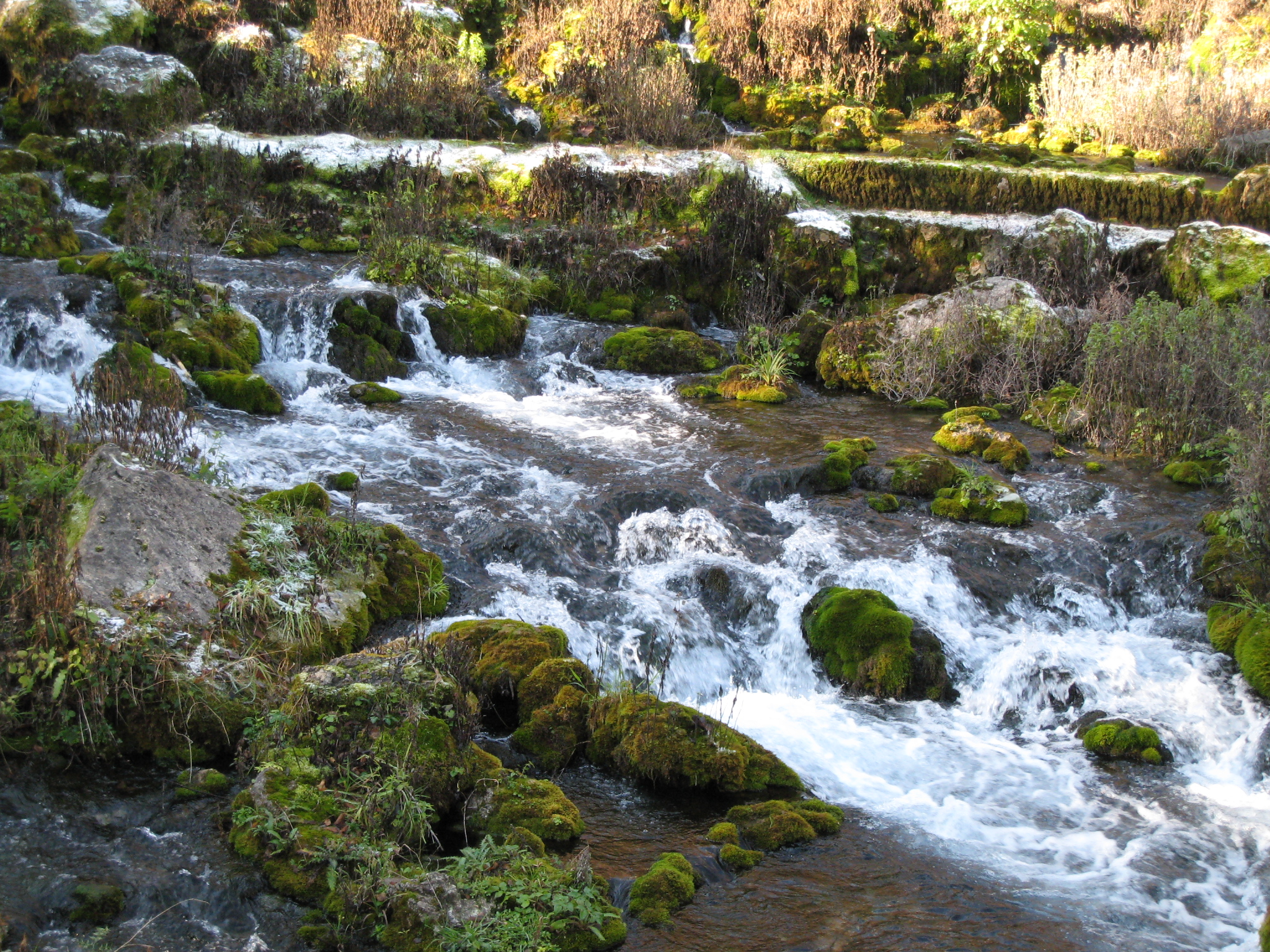 Naoussa, Greece park, Agios Nikolaos.